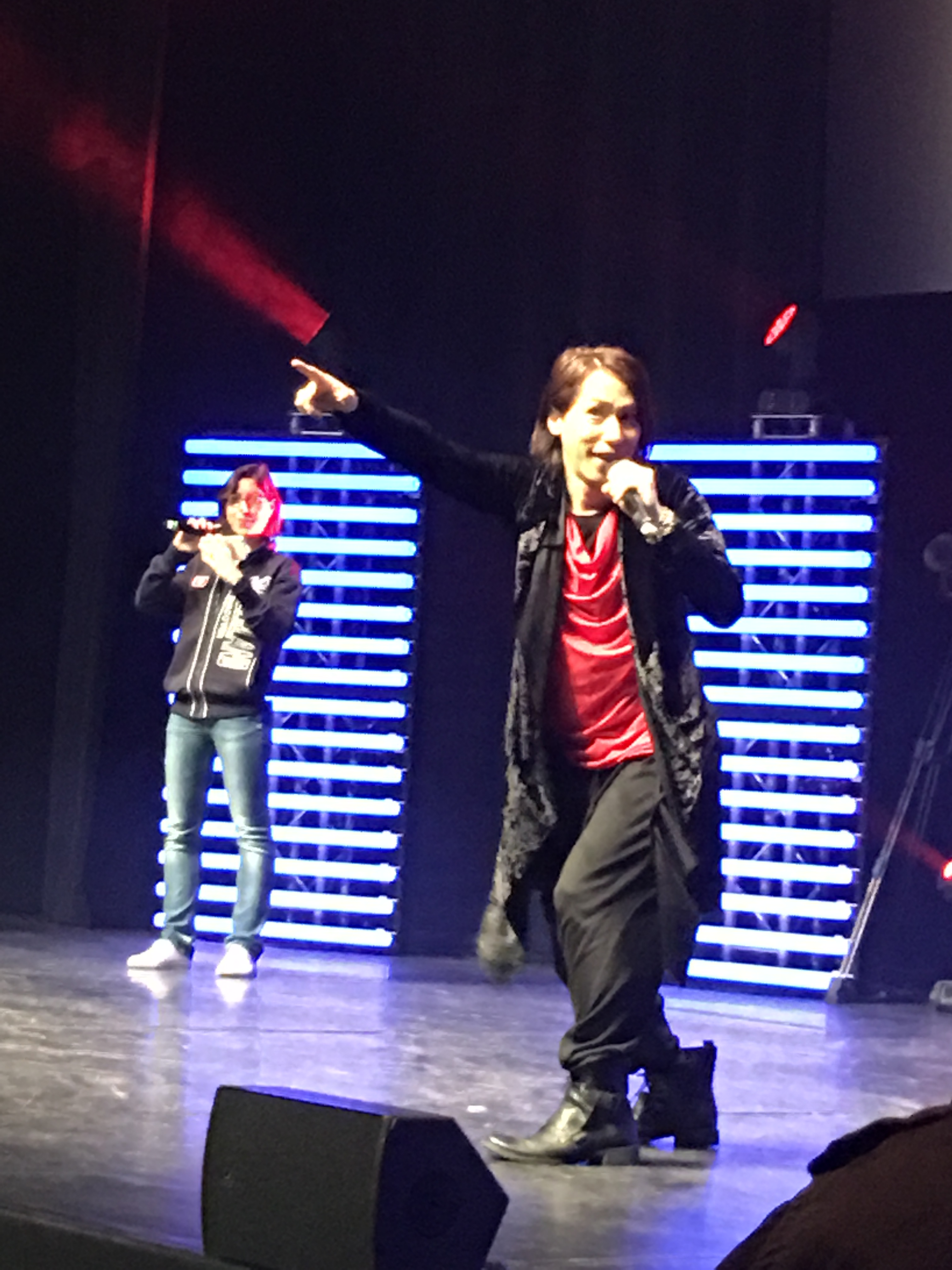 Takayoshi Tanimoto concert during Polymanga 2017 in Montreux, switzerland